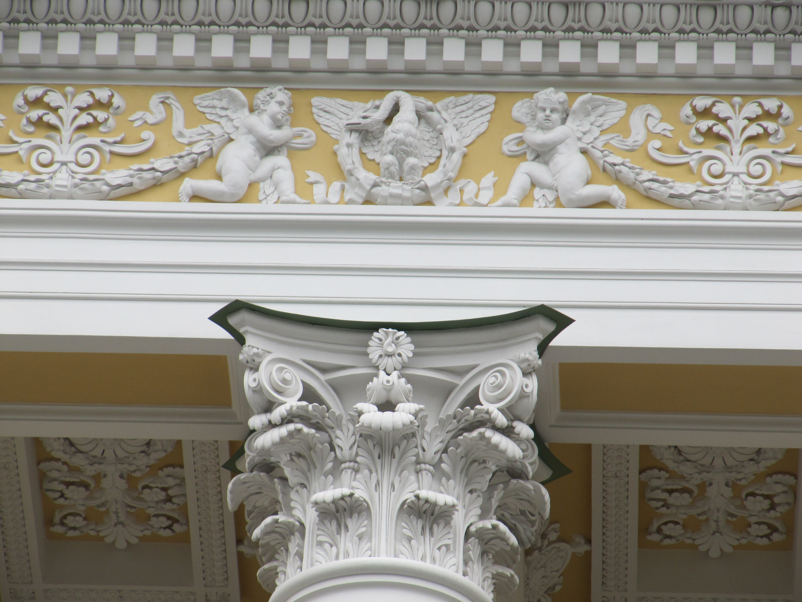 фрагмент барельефа фасада дома Лобанова-Ростовского А.Я.